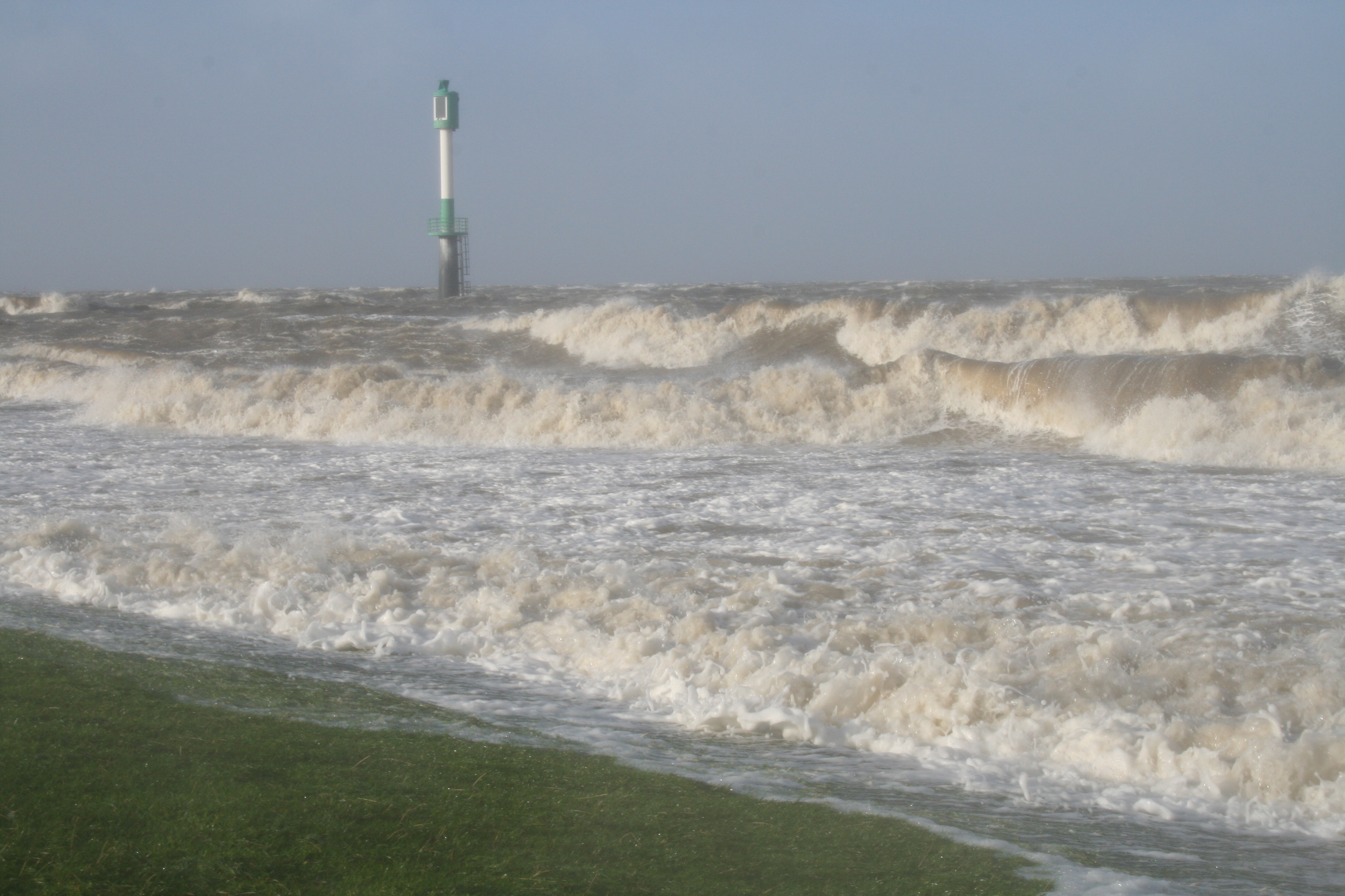 Schwere Sturmflut an Glameyer Stack am 9. November 2007